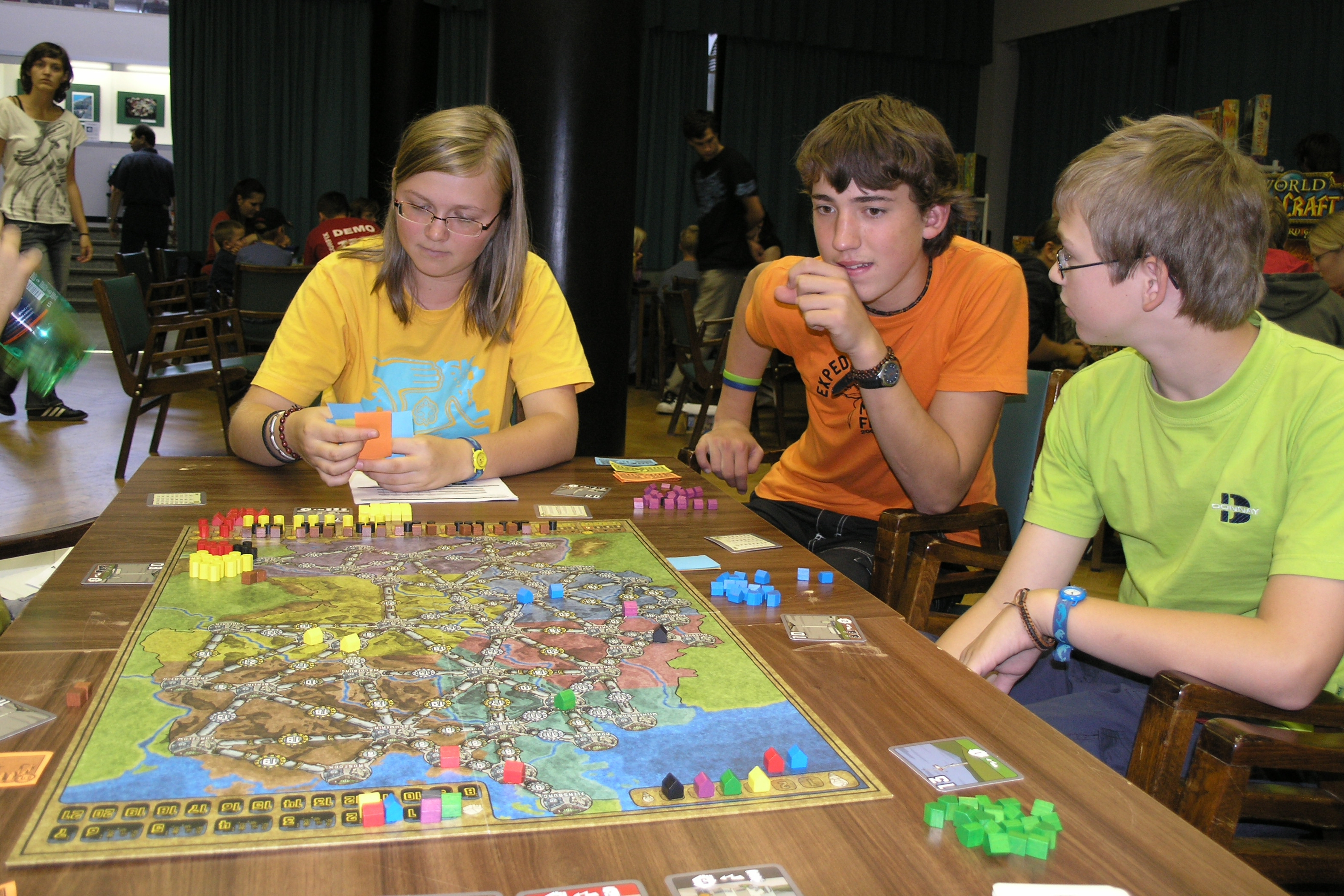 Hry a hlavolamy 2008 - festival her a hlavolamů v Praze, Holešovicích